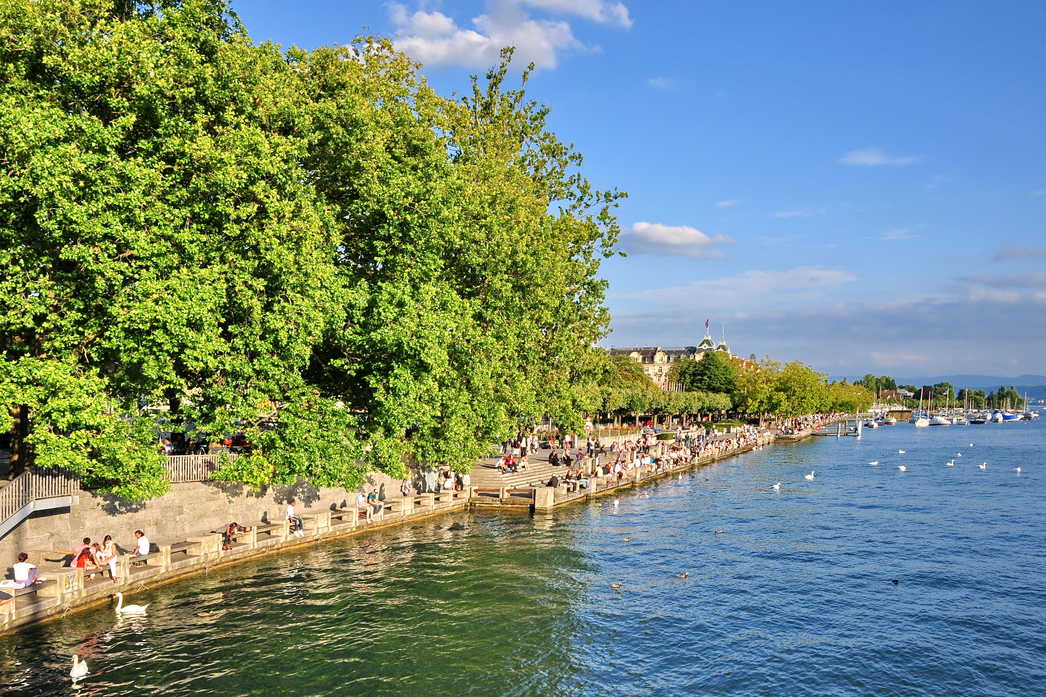 Standort der neolithischen 'Pfahlbausiedlung' Kleiner Hafner im unteren Zürichseebecken beim heutigen Utoquai in Zürich (Switzerland)